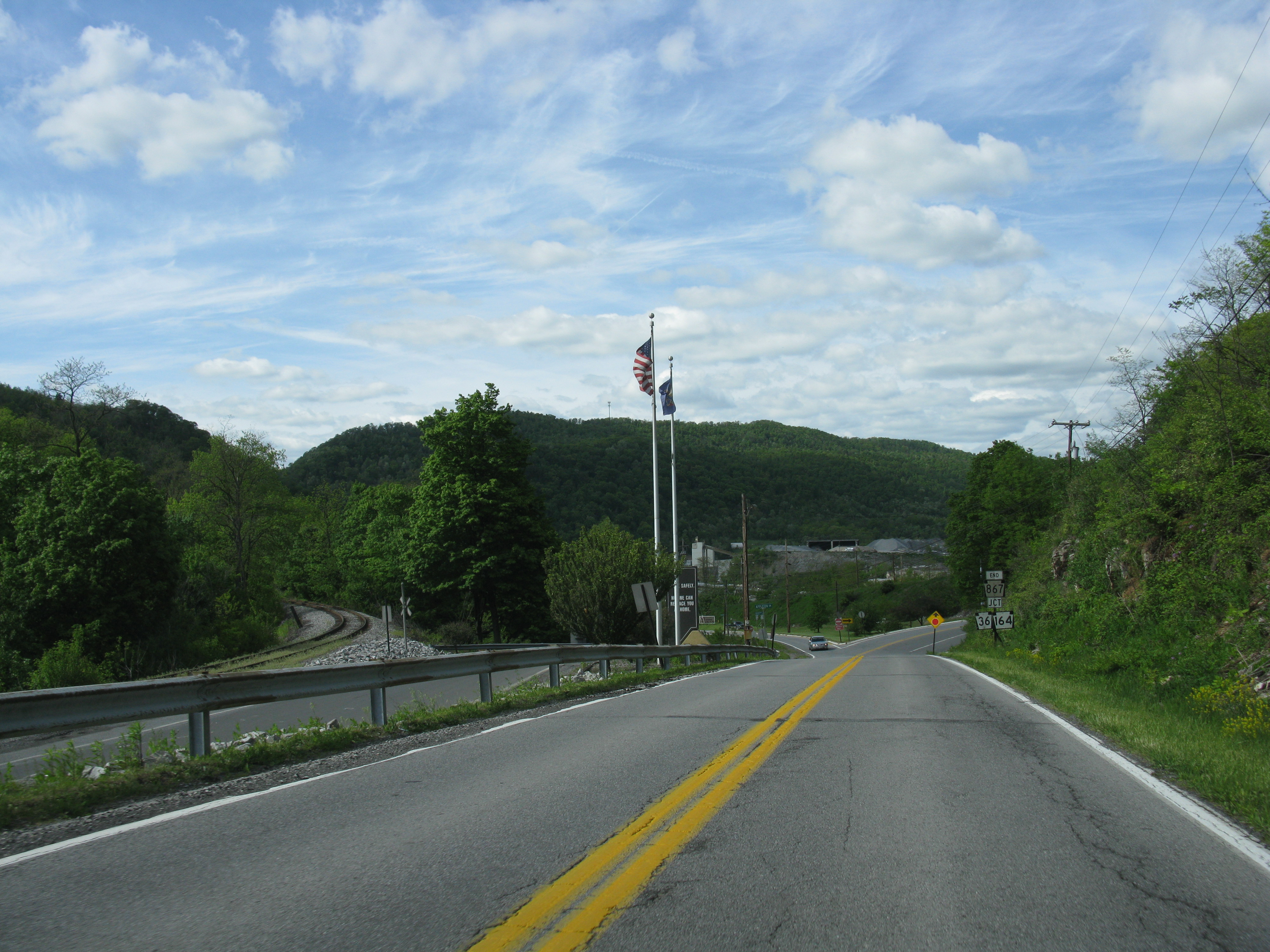 SR 867, Roaring Spring, Pennsylvania